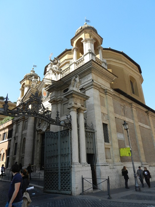 Città del Vaticano - Chiesa di S. Anna dei Palafrenieri